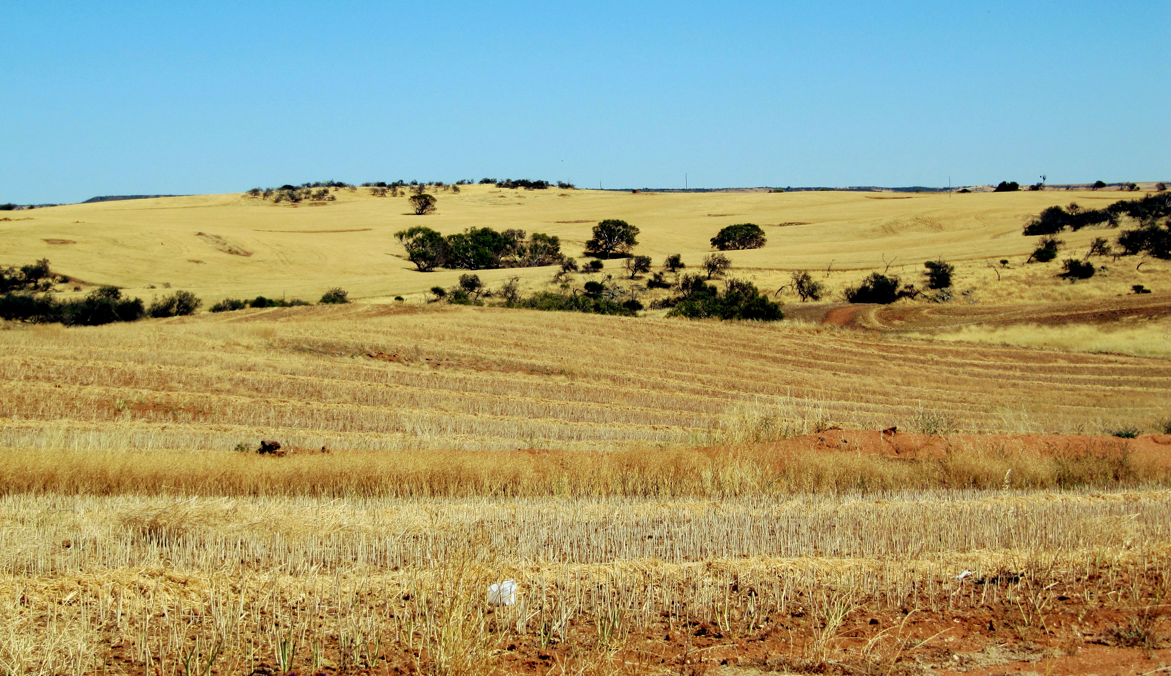 Champs après la récolte - Geraldton WA